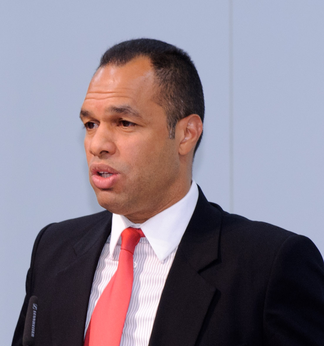 Peter Sloly (Deputy Police Chief, Toronto Police Service) Toronto Roadshow – Good Ideas from Canada Urbane Ballungsräume sind oft geprägt von multikultureller Vielfalt. Dieser Vielfalt gerecht zu werden und jedem Einzelnen eine Chance auf Selbstverwirklichung zu bieten, ist eine soziale, ökonomische und politische Herausforderung für alle Metropolen dieser Welt. Viele Städte stellen sich dieser Herausforderung und haben innovative Ansätze der Inklusion entwickelt – oft unabhängig von der nationalen Politik ihres Landes. Um diese Initiativen populär zu machen, lädt die Heinrich-Böll-Stiftung mit der Maytree Foundation und der Botschaft von Kanada zu einem Dialog der Städte zwischen Berlin und Toronto ein. Unter dem Titel „Toronto Roadshow - Good Ideas from Canada“ sollen Berlin und Toronto miteinander ins Gespräch kommen, um sich über die städtische Politik des Multikulturalismus und der Inklusion sowie deren praktische Umsetzung auszutauschen und so von den Erfahrungen der jeweils anderen Metropole zu lernen. Dabei werden ausgewählte Vertreter/innen verschiedener Politik- und Gesellschaftsbereiche (Politik, Verwaltung, Arbeit & Wirtschaft, Bildung, Medien & Kultur, Polizei) von ihrer Arbeit vor Ort berichten und erfolgreiche Projekte vorstellen. Im Rahmen der „Toronto Roadshow“ besucht die Maytree Foundation mit ihrer Delegation insgesamt vier Städte in Deutschland: Stuttgart, Hamburg, Berlin und Köln. Foto: Stephan Röhl